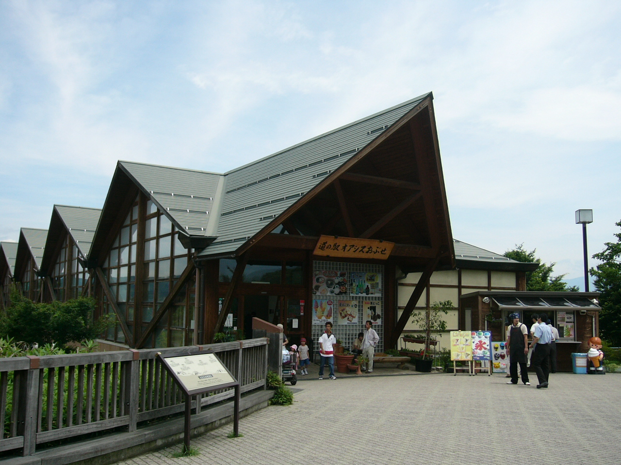 Michinoeki Oasis Obuse (道の駅オアシスおぶせ Nagano)